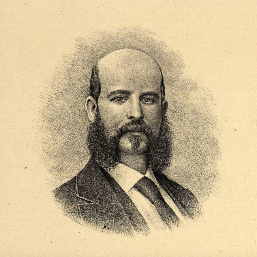 El militar Francisco Landero y Cos en una litografía publicada en 1888 por Ireneo Paz en su libro "Los hombres prominentes de México".